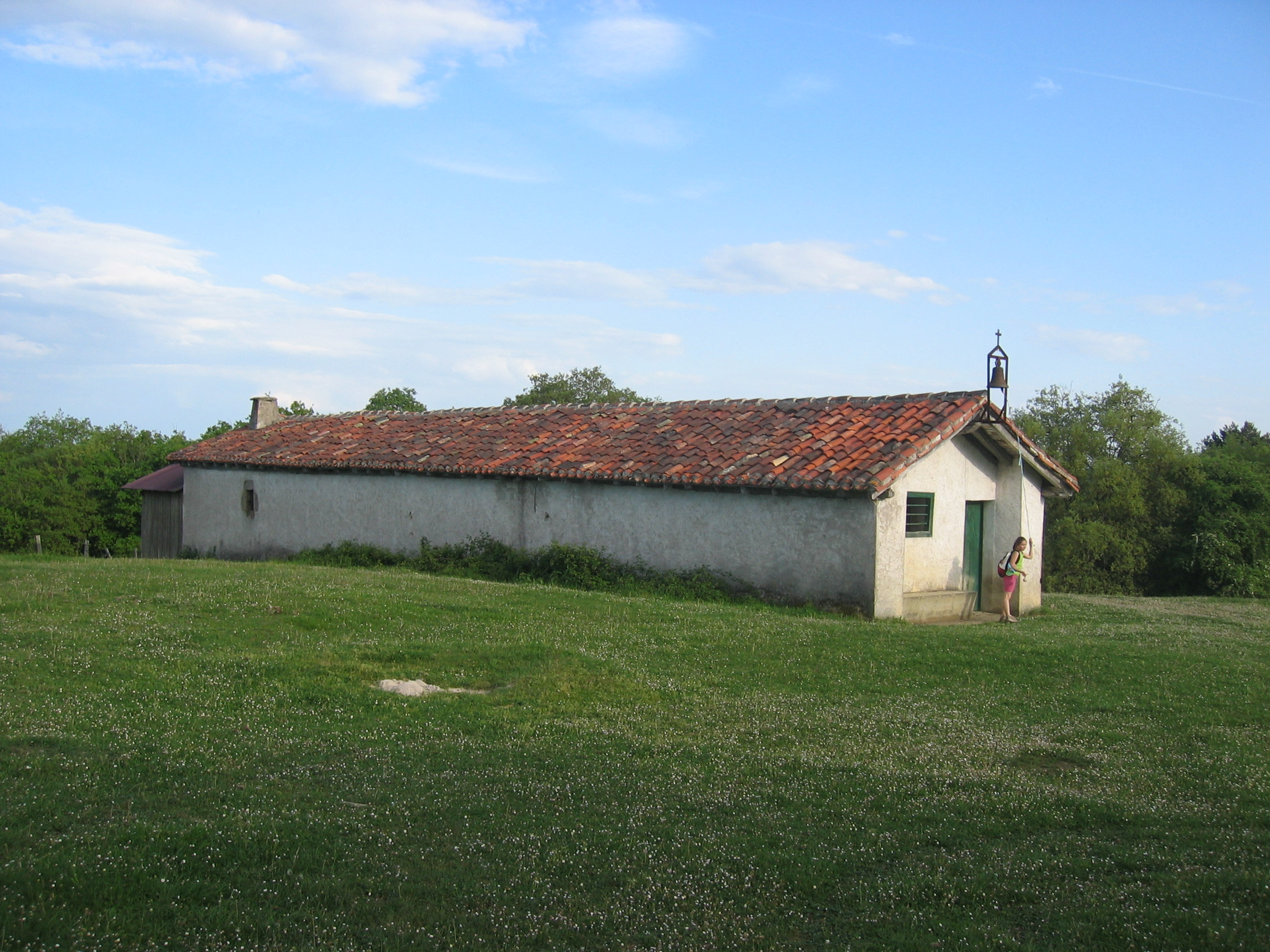 Ermita de Santa Lucía, situada en la cima del Arañotz, en el centro el valle de Ultzama